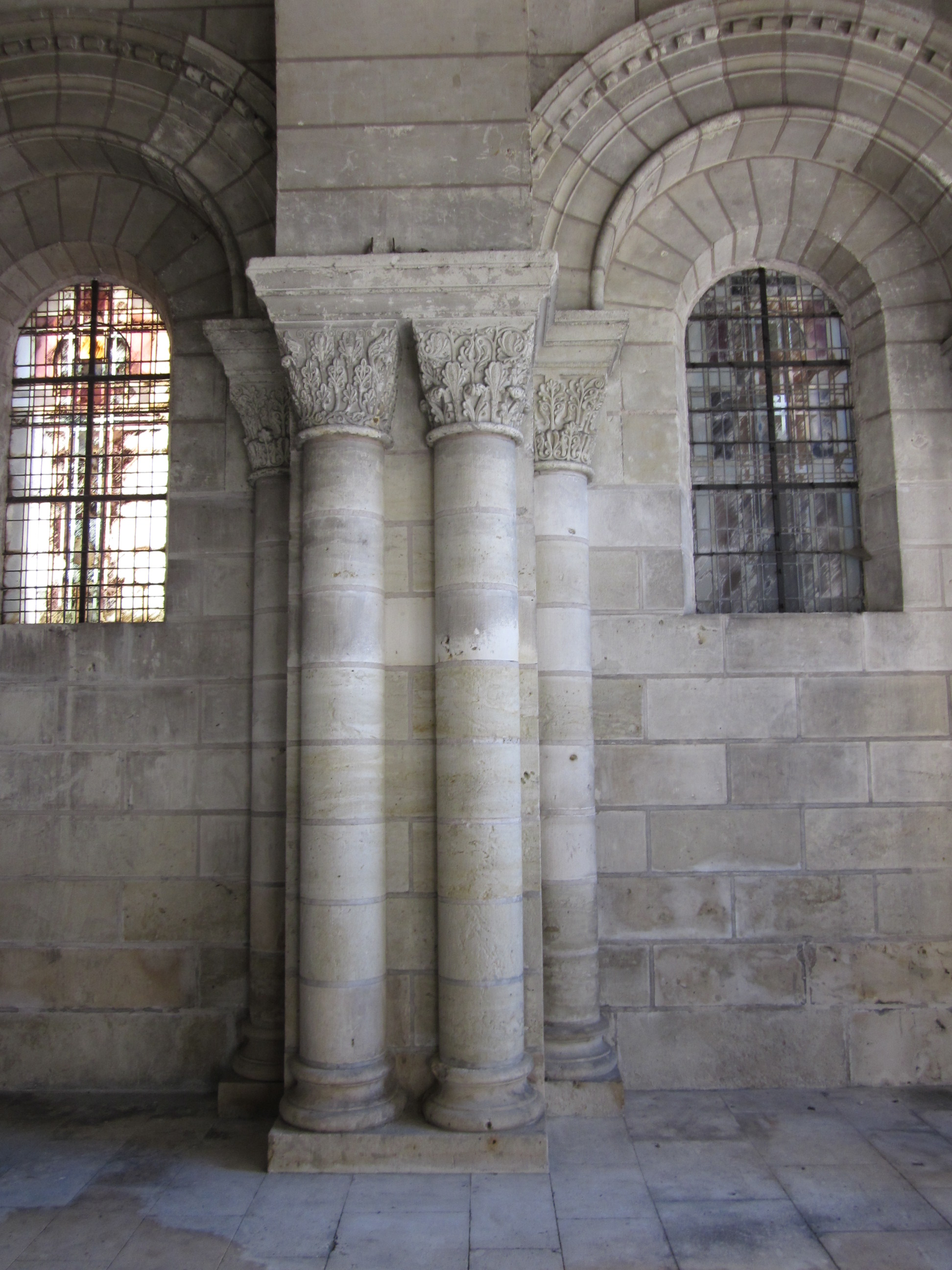 Pilier du porche de l'église Saint-Julien de Tours (Indre-et-Loire, France)